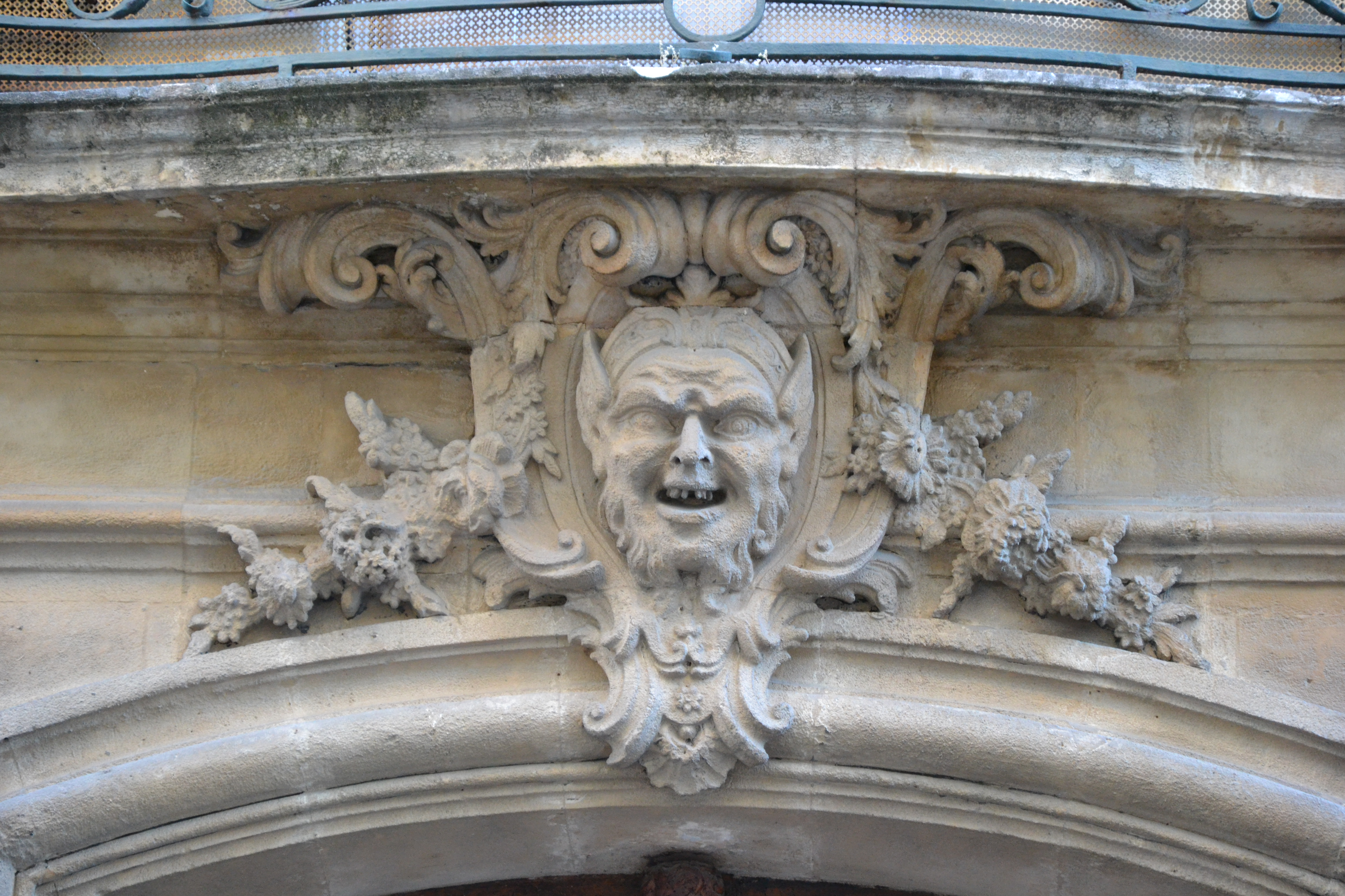 Hôtel de Rochegudebalcon, élévation (Inscrit) .